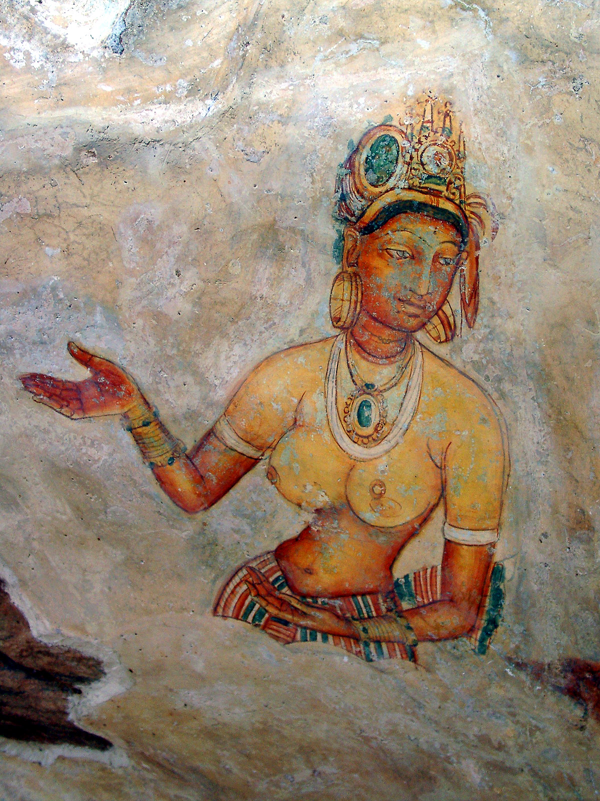 Fresco in Sigiriya in Sri Lanka